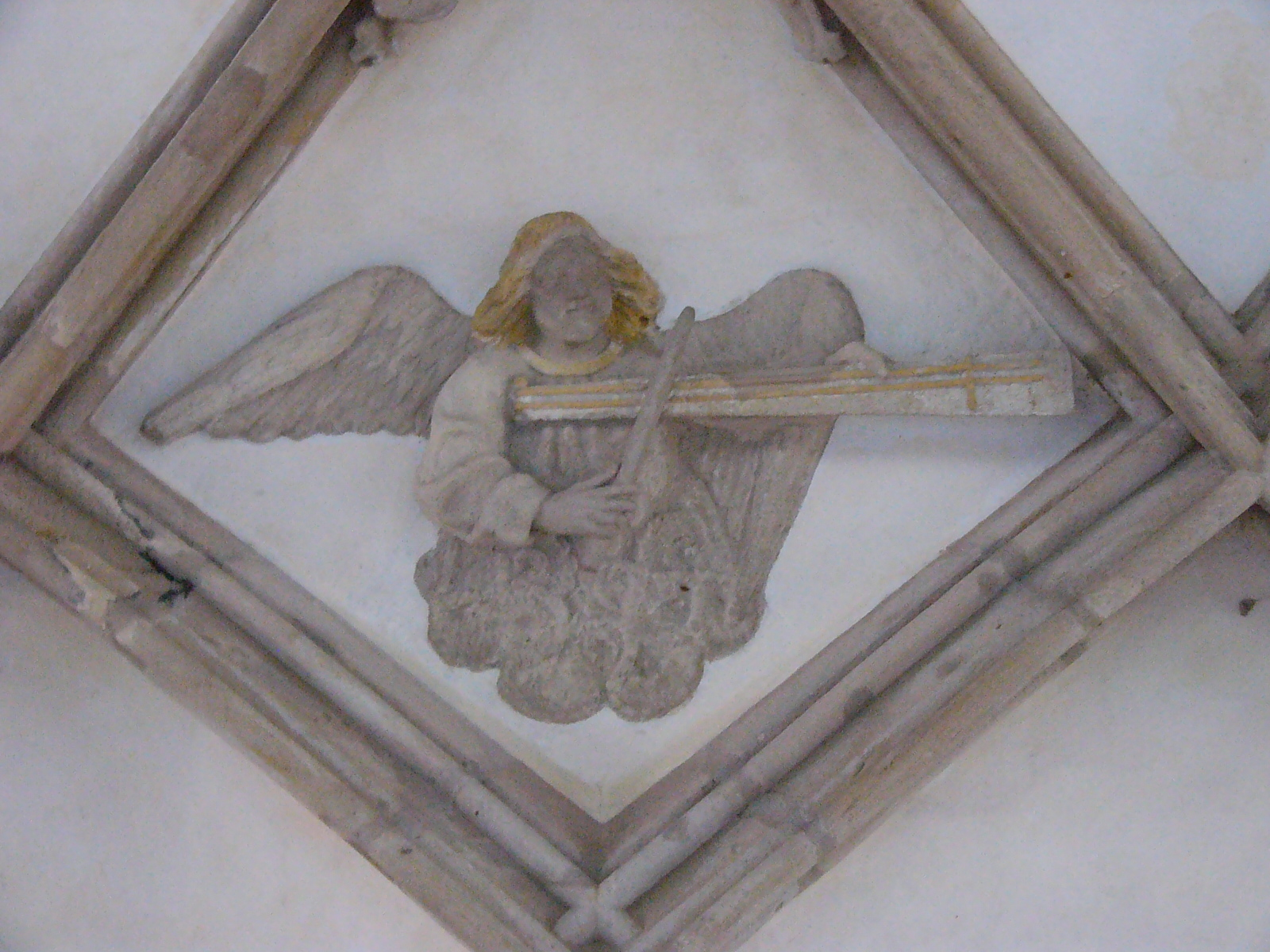 Musizierende Engel im Gewölbe des Himmelkroner Kreuzgangs